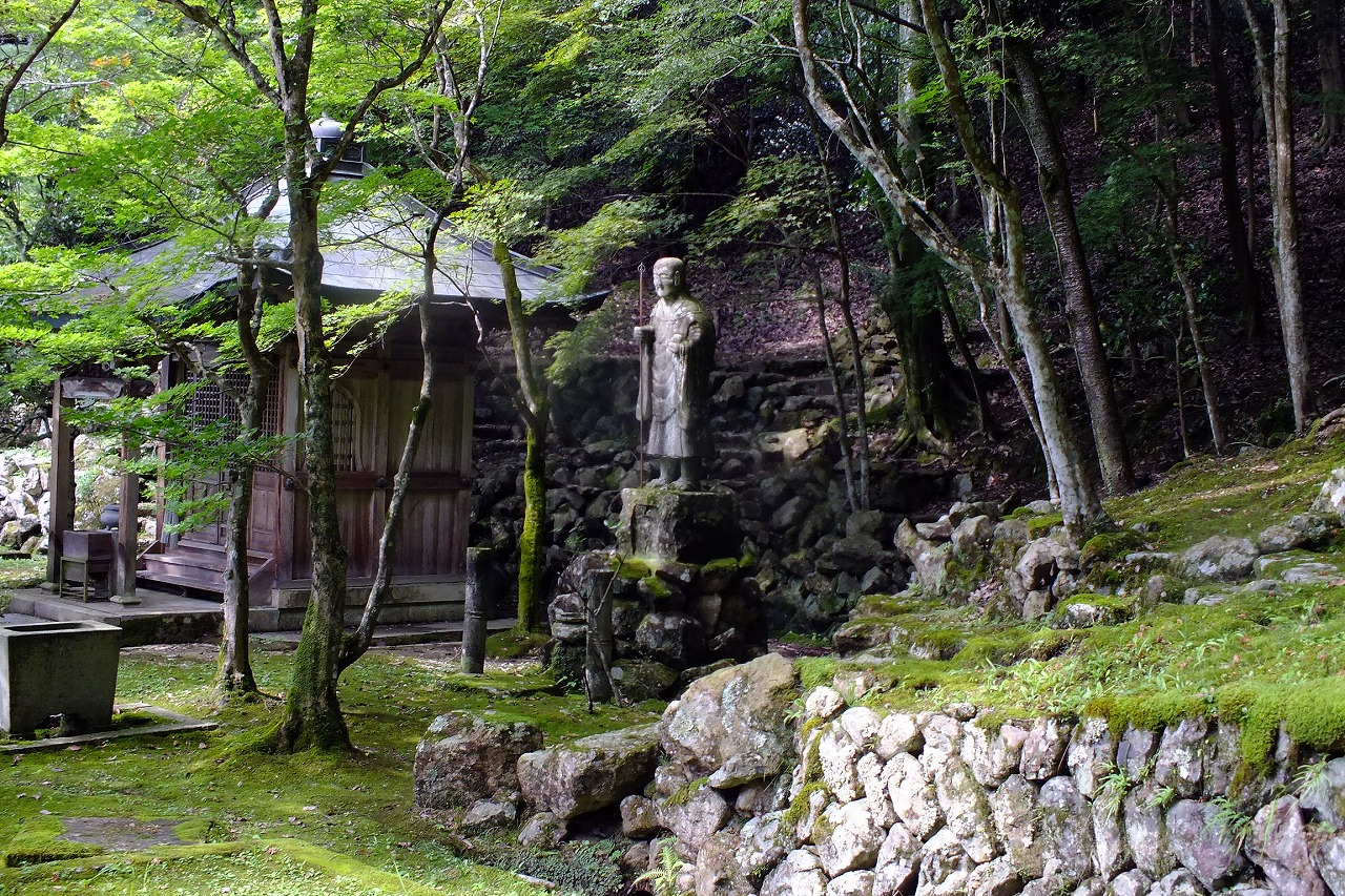 2015-10-01 Sioda-Onsen Ueyama Ryokan（湯元上山旅館）